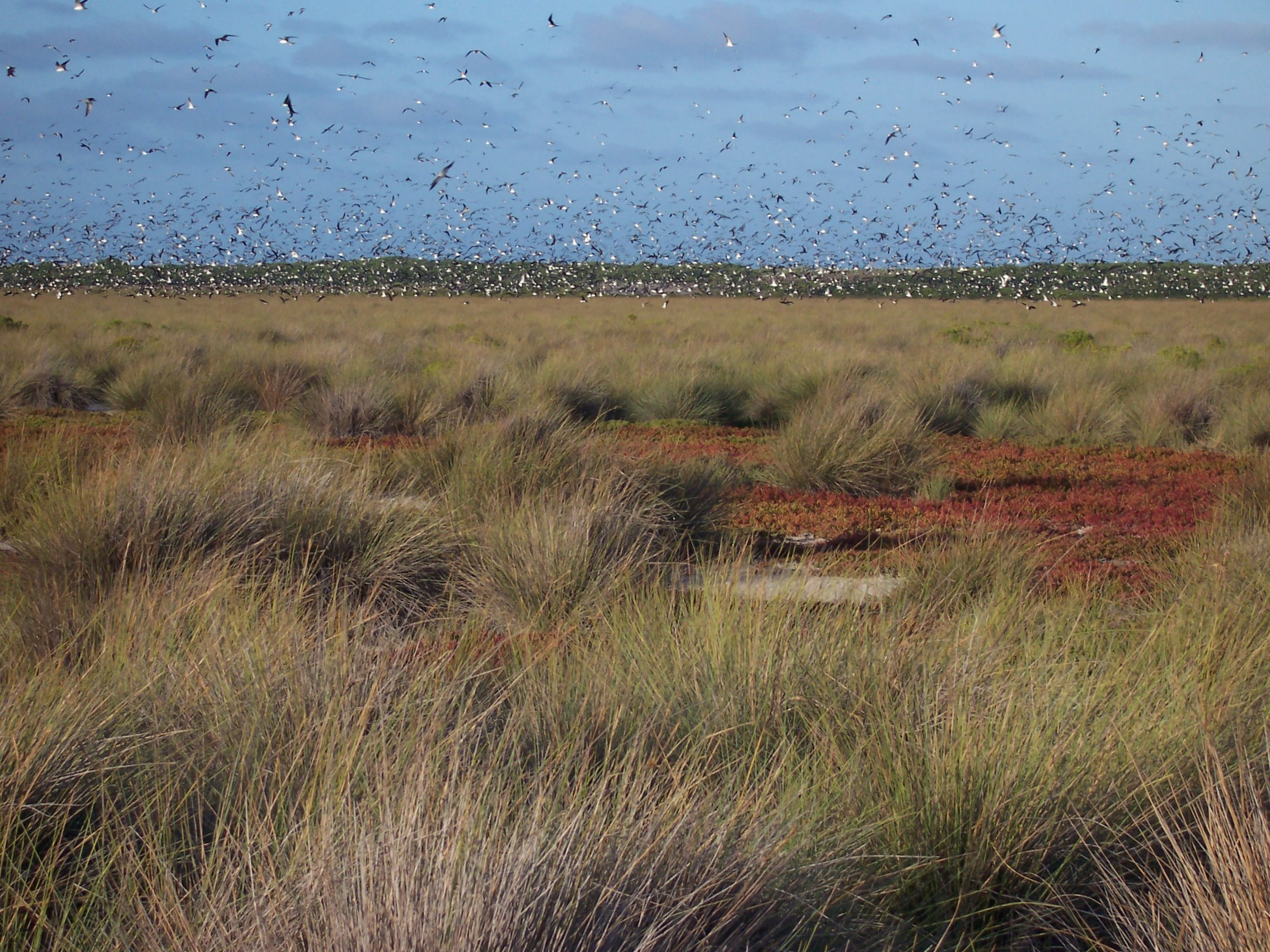 tournoiement de dizaines de milliers de sternes fuligineuses Onychoprion fuscatus (syn. Sterna fuscata) au-dessus des zones de nidification de la partie steppique de l'île Europa